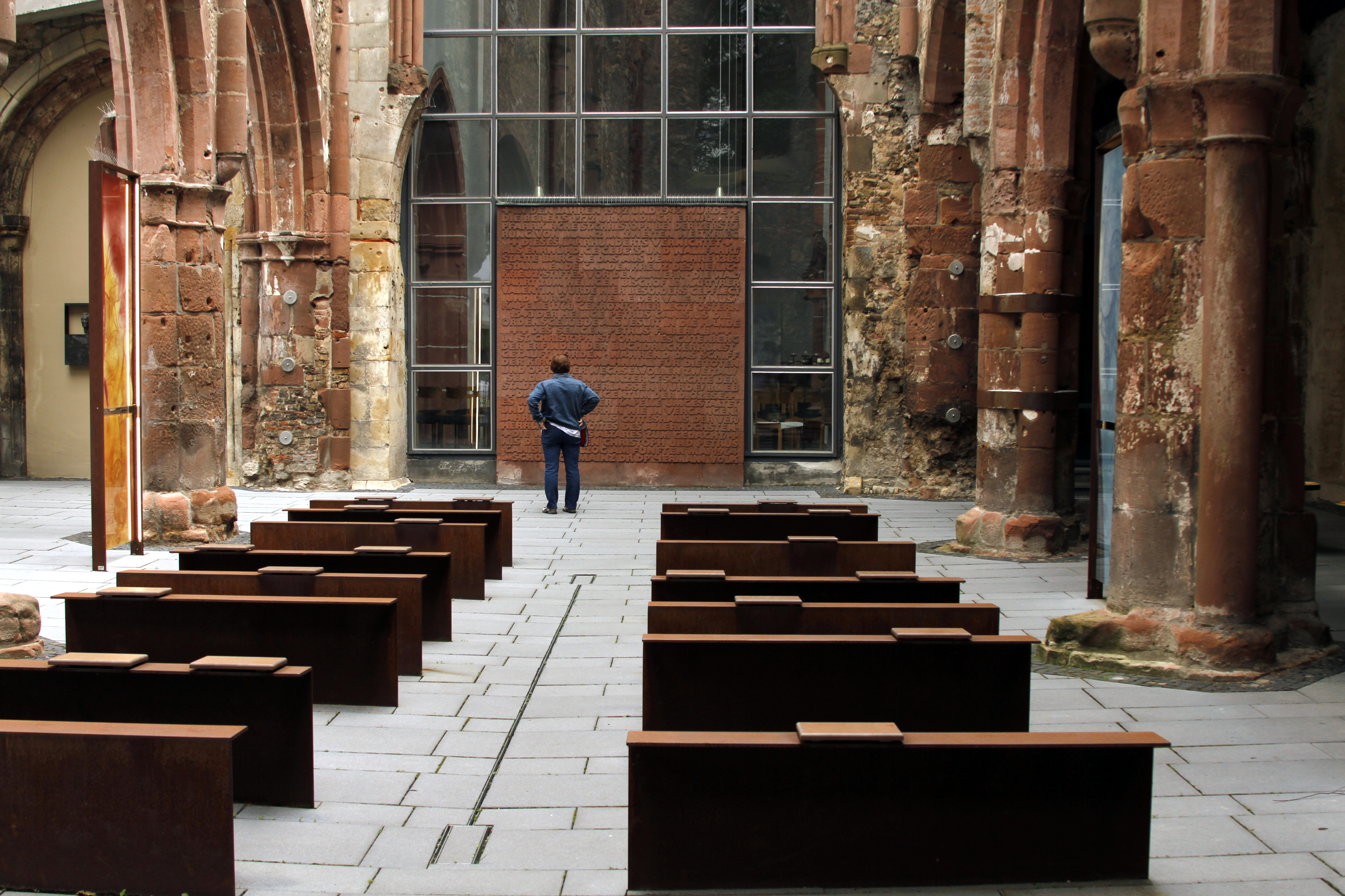 St. Christoph - Mainz - Germany